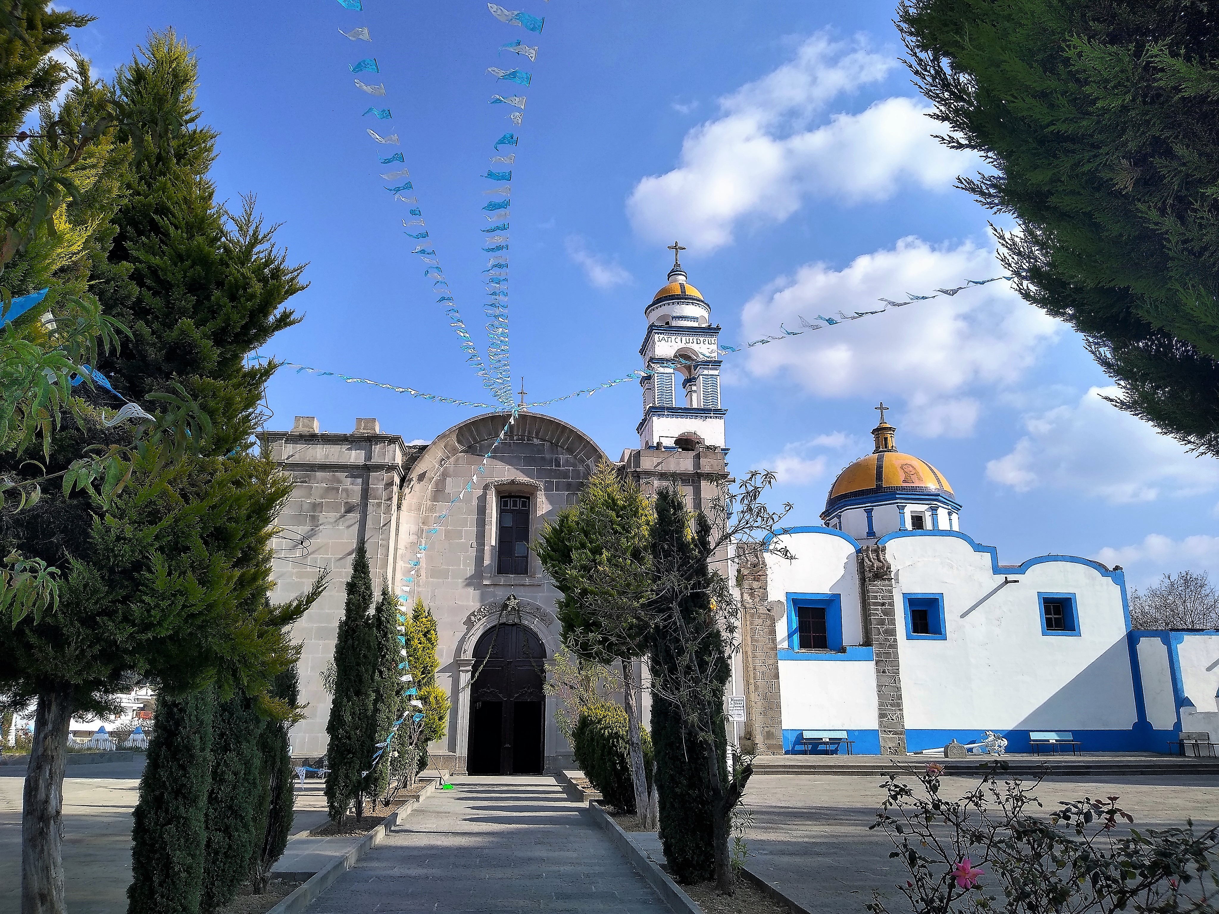 Parroquia de San Martín de Tours en Xaltocan, Tlaxcala 01